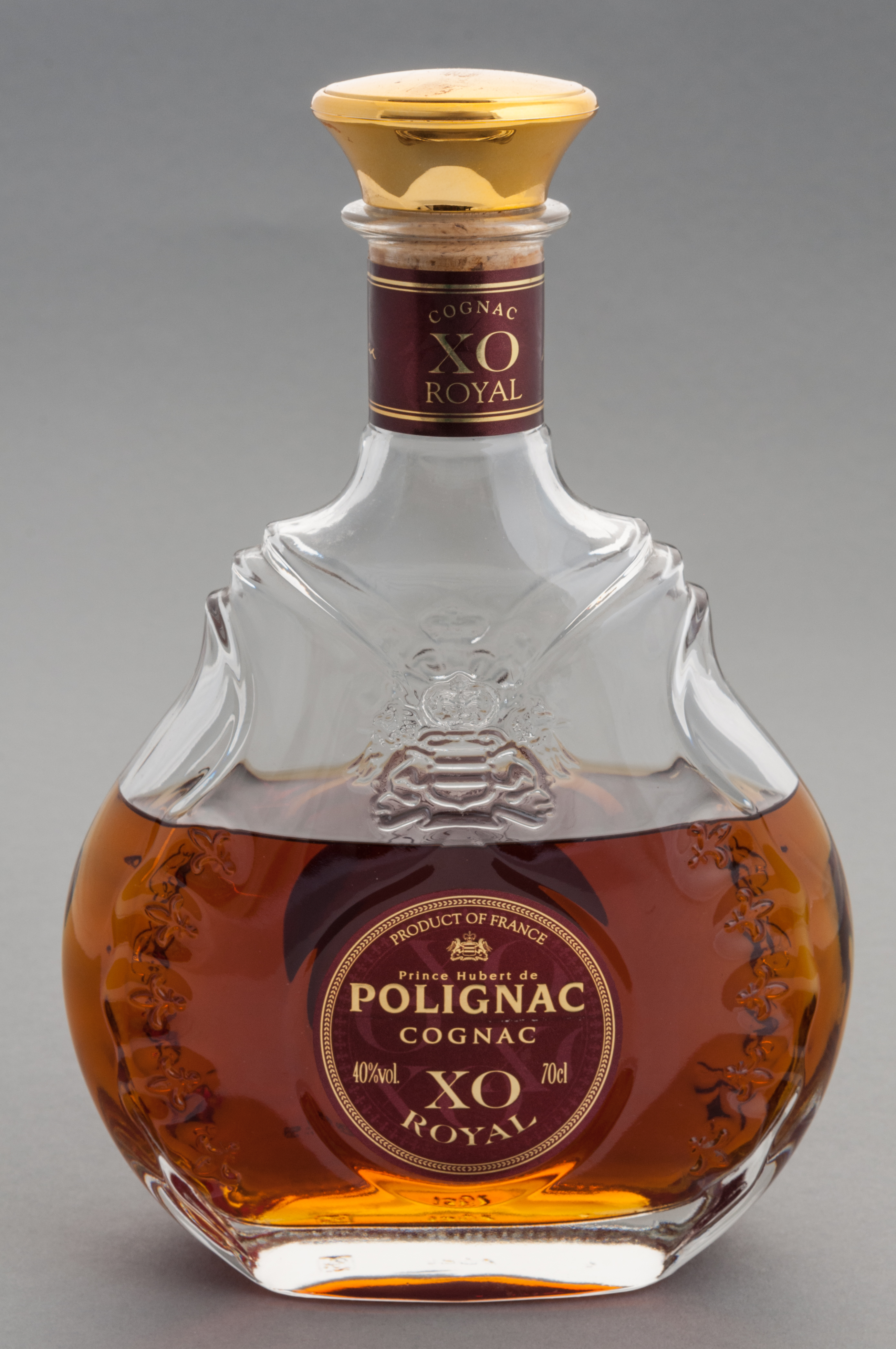 Flasche